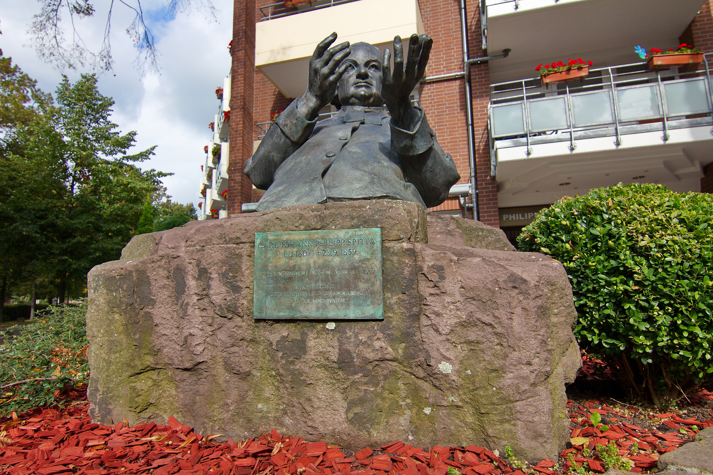 Carl Johann Philipp Spitta ( 1. August 1801 in Hannover; † 28. September 1859 in Burgdorf) war ein deutscher lutherischer Theologe und Dichter.